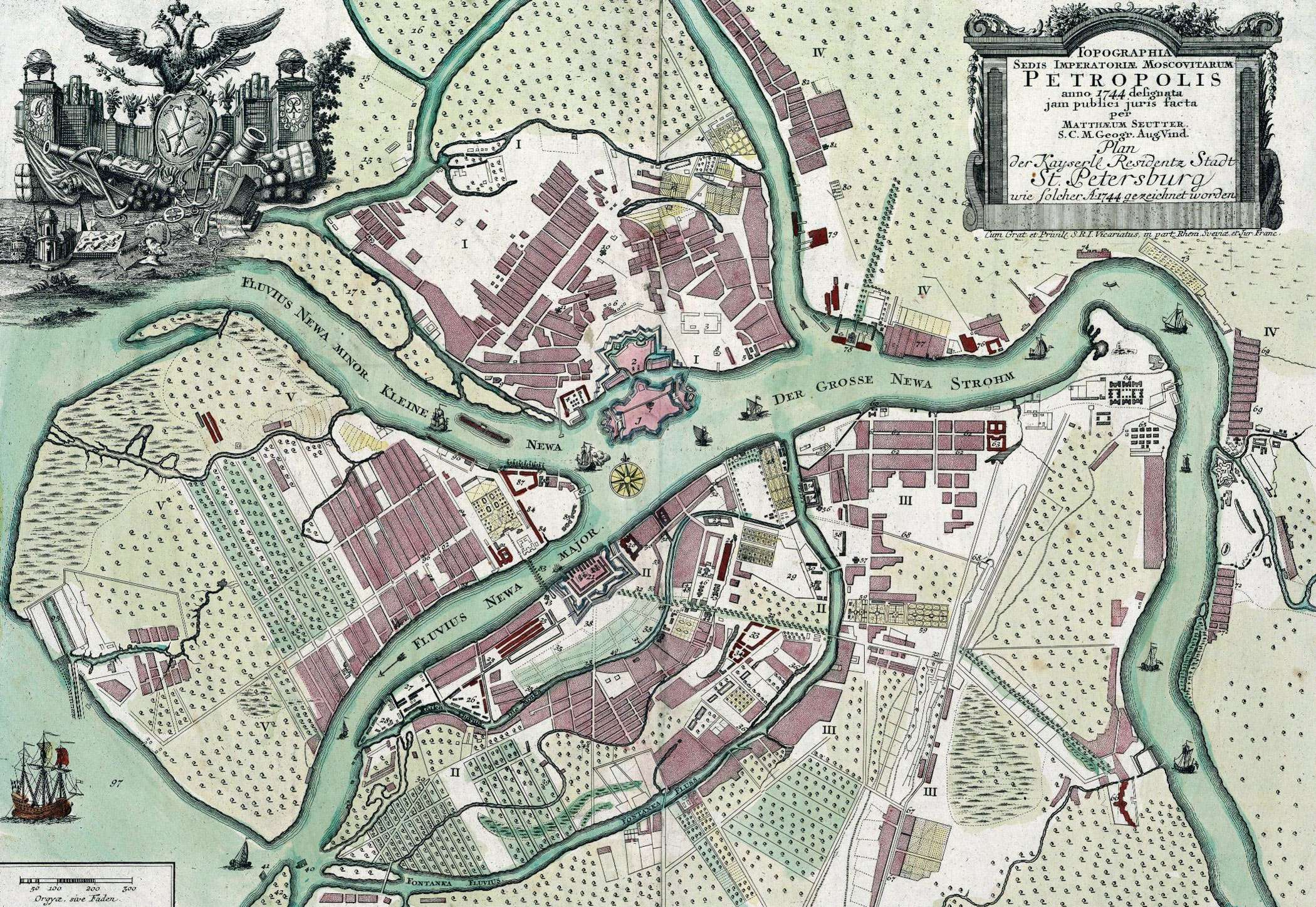 Карта Санкт-Петербурга составленная в 1744 г. Маттиас Сойтер